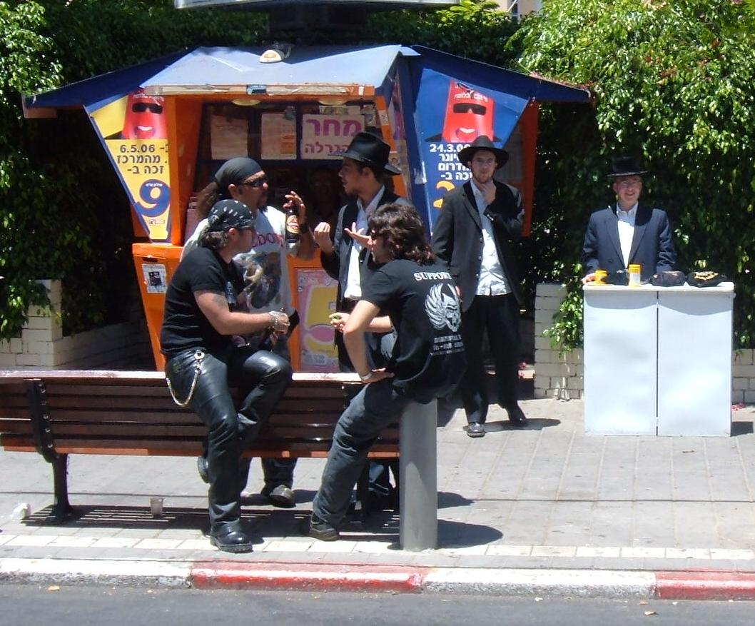 Discussion entre motards et religieux dans une rue branchée